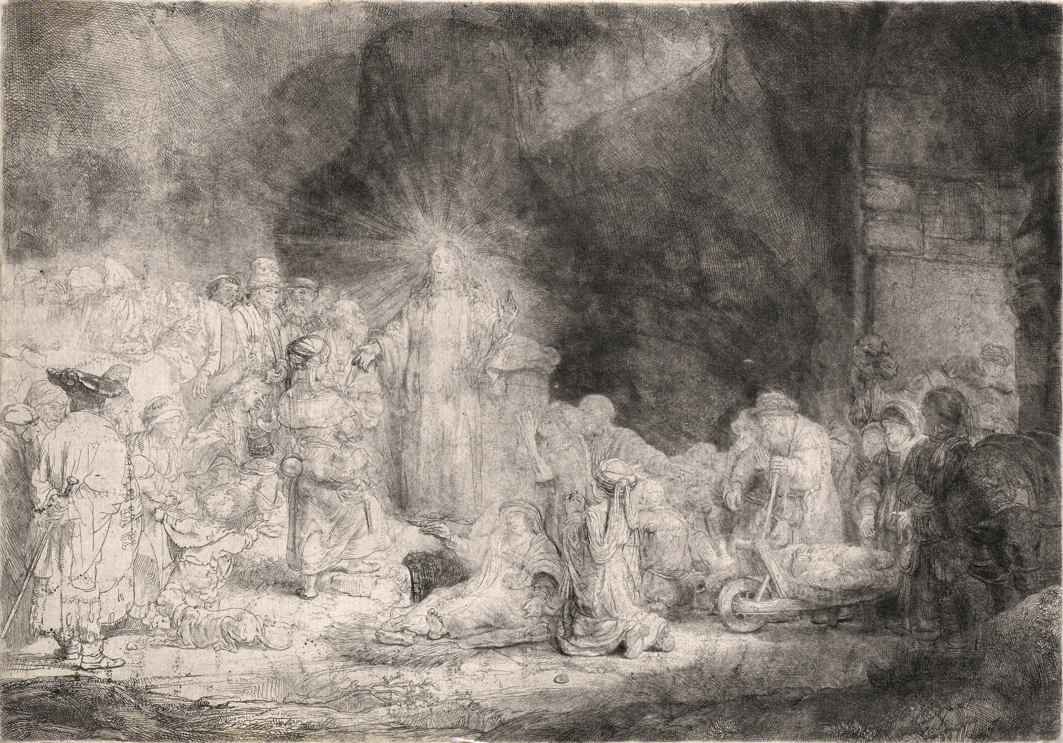 Rembrandt van Rijn: Kristus uzdravuje nemocné, stozlatkový list (1649), suchá jehla, mědiryt, nedokončeno, před retušemi, 275x395 mm, Národní galerie v Praze